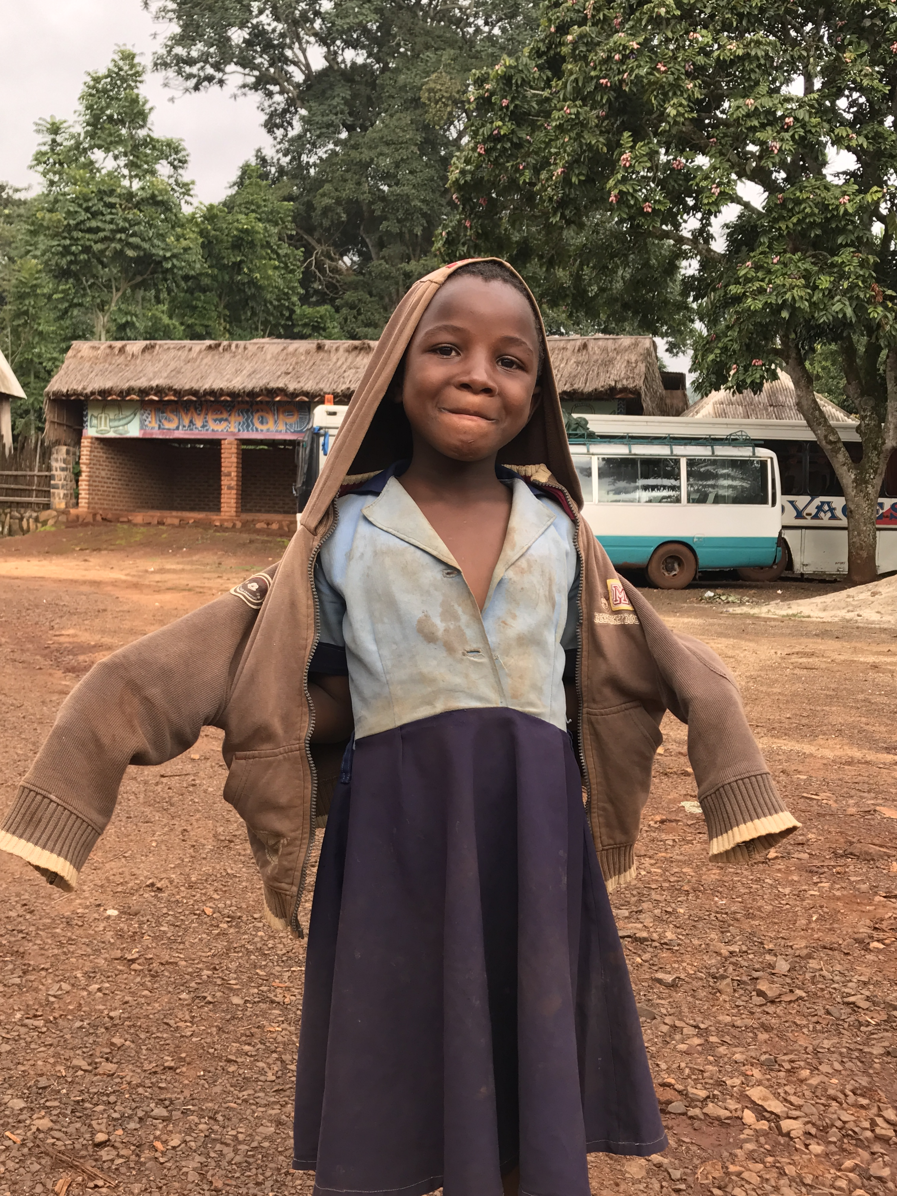 Dans le cadre d'une mission humanitaire menée par une association du Cameroun, "les enfants de Metchachri", j'ai pris le cliché de cette jeune fille dans le village de Batoufam dans l'ouest du Cameroun en aout 2017. This is an image with the theme "Africa on the Move or Transport" from: Cameroon